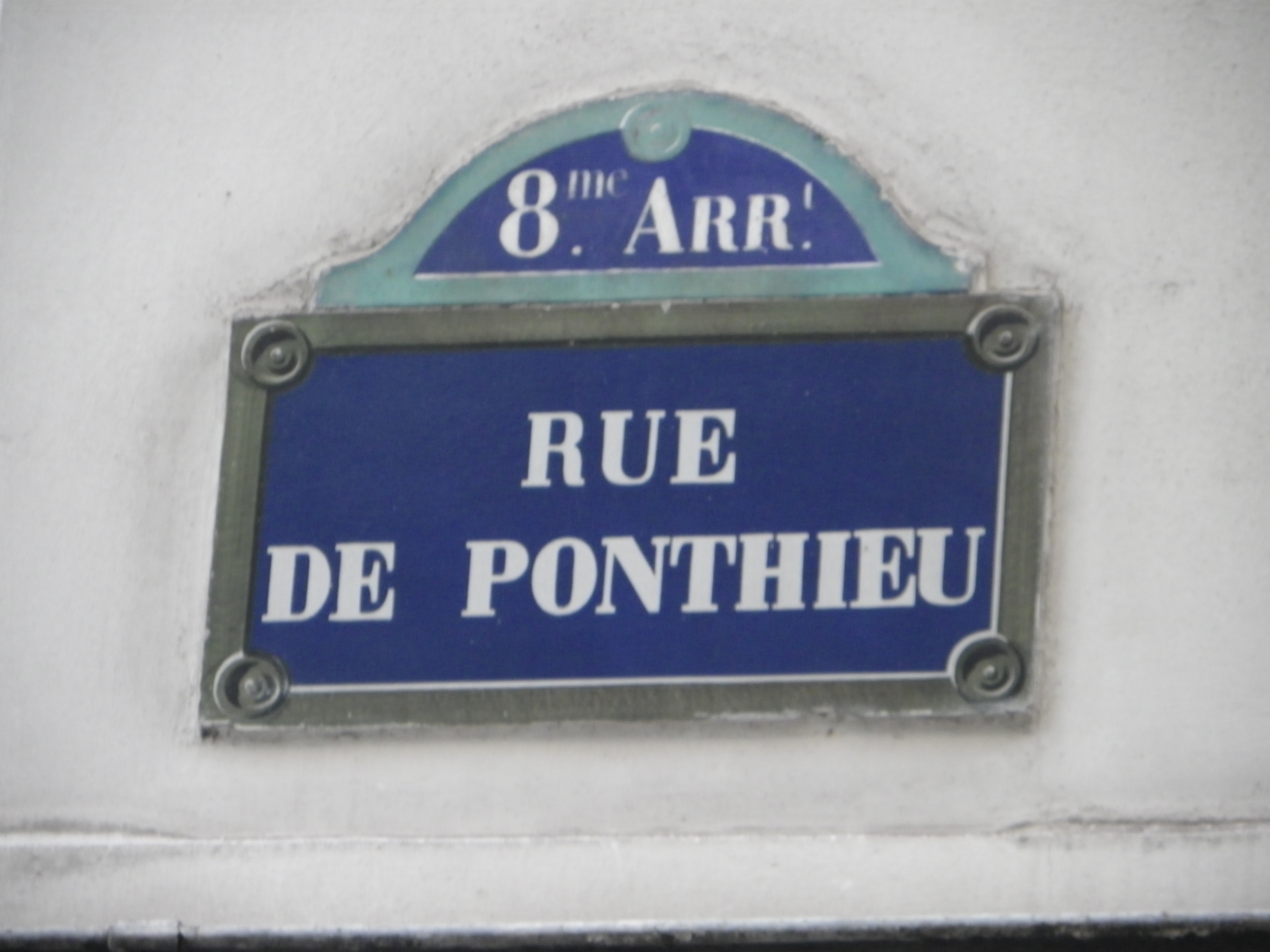 Rue de Ponthieu à Paris